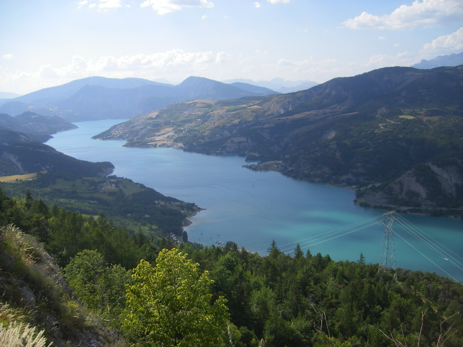 Lac de Serre-Ponçon as viewed from St.Vincent-les-Forts